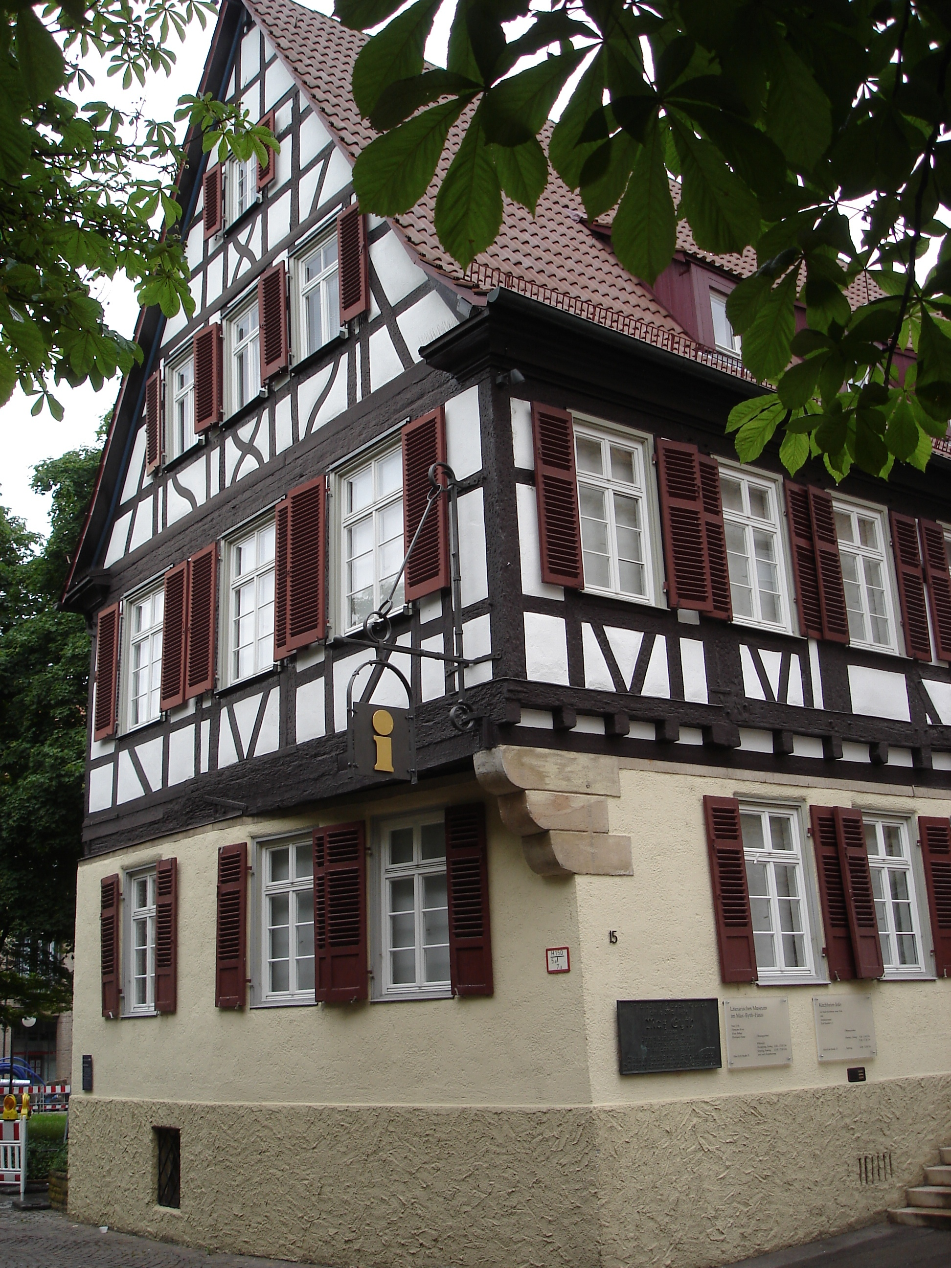 Geburtshaus Max Eyth in Kirchheim/Teck